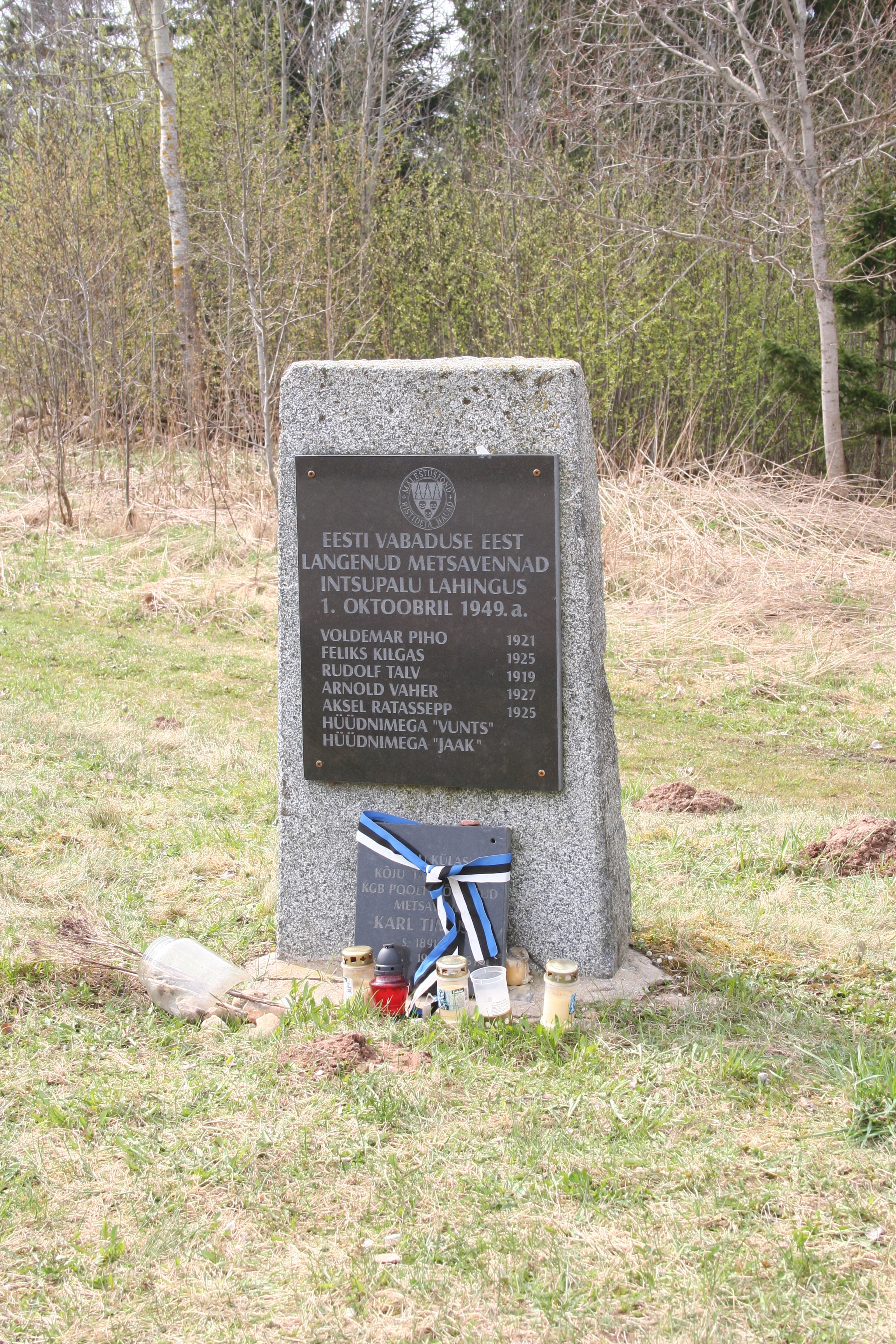 Intsupalu lahingu mälestusmärk Põlvamaal Kõlleste vallas Voorepalu külas, vana Tartu-Võru postitee kõrval, Palu talu ja Kükka kõrtsi vahel